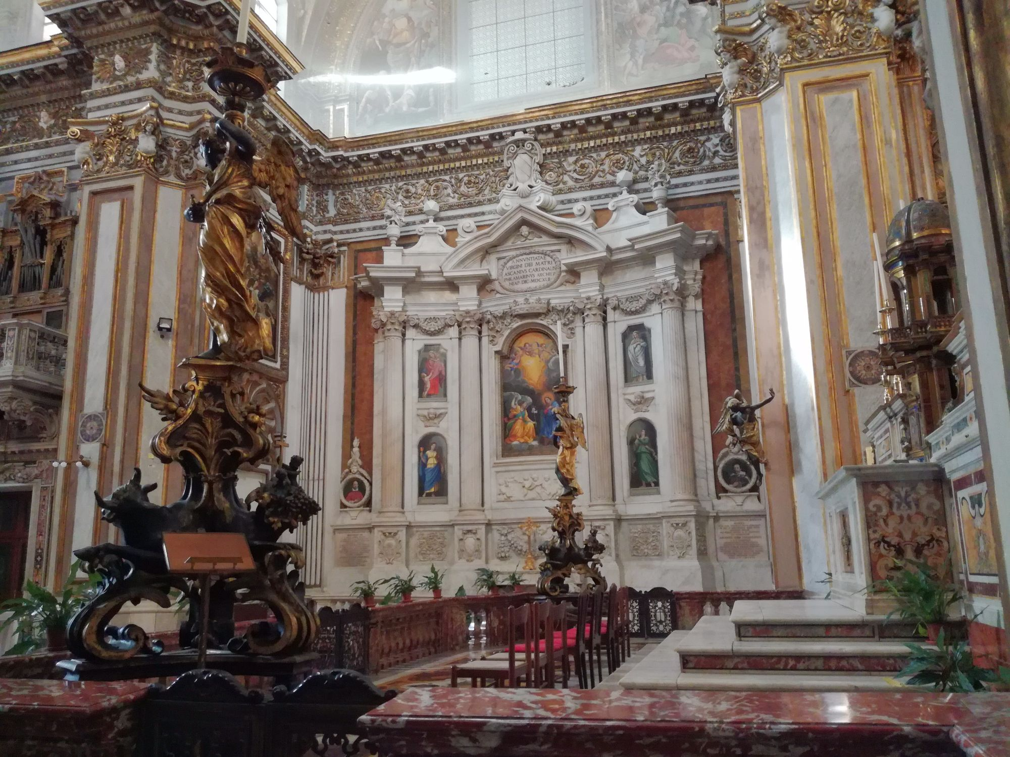 Transetto Santi Apostoli